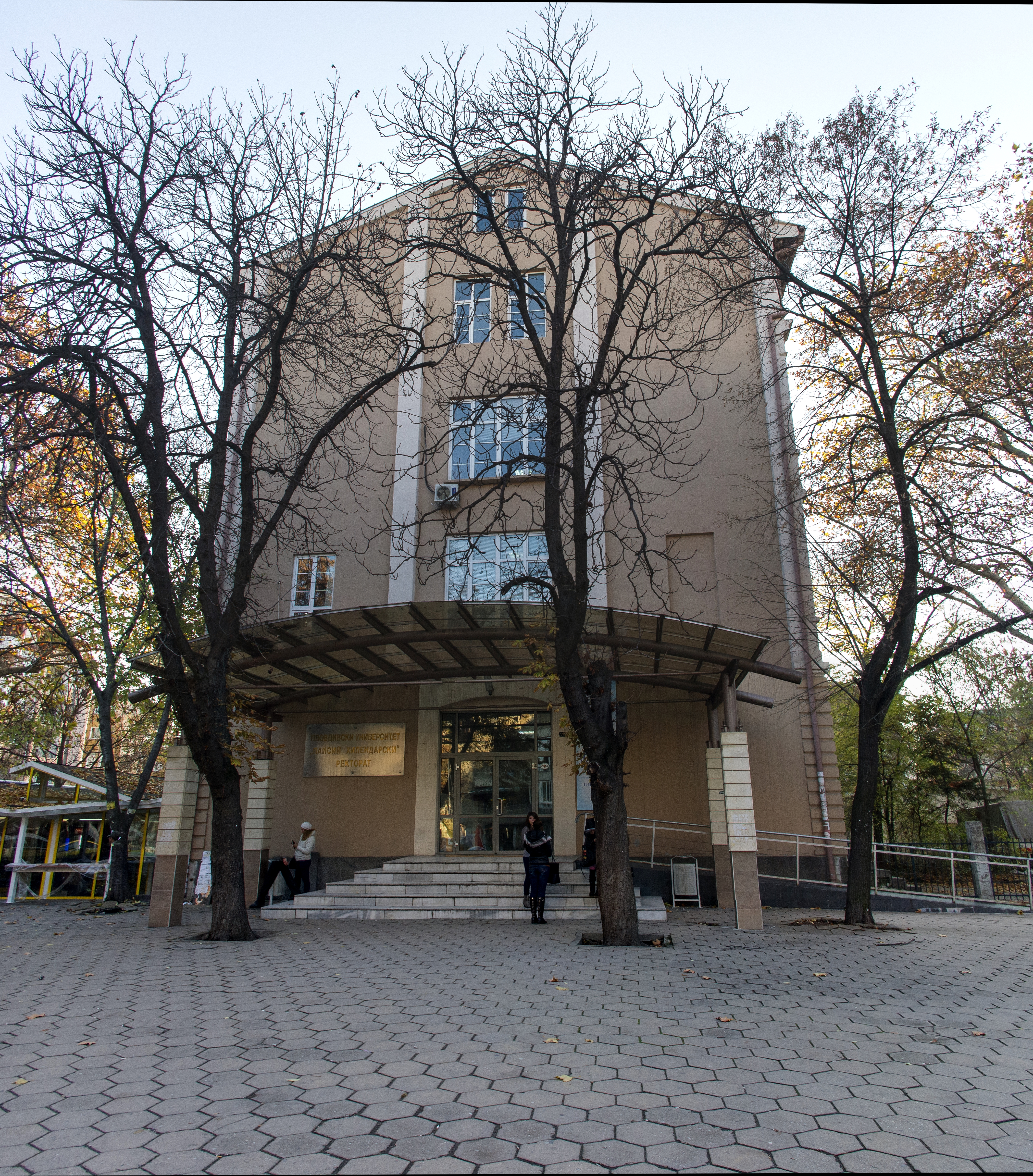 Пловдивски Университет, ректорат